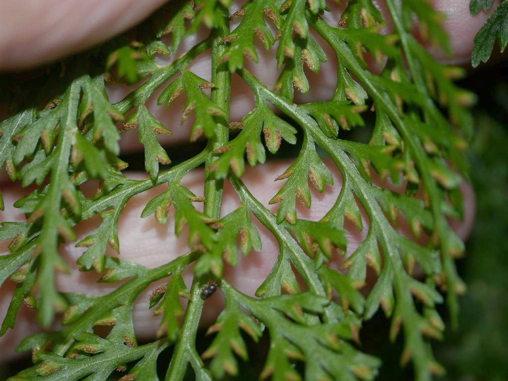 Asplenium ritoense：コウザキシダ 2014/10/25 和歌山県すさみ町：Susami Town. Wakayama Pref. Japan